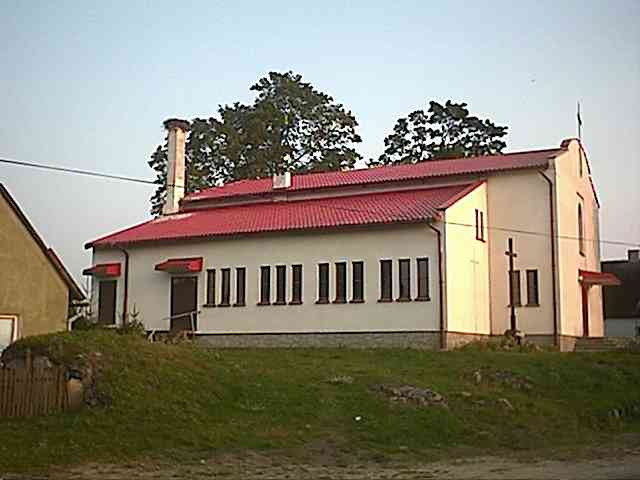 Bobrowo - rzymskokatolicki kościół filialny p.w. Najświętszego Serca Pana Jezusa, 1997 (wybudowany na miejscu zburzonego około 1950 roku. Zdjęcie wykonał Zygmunt Cichecki)